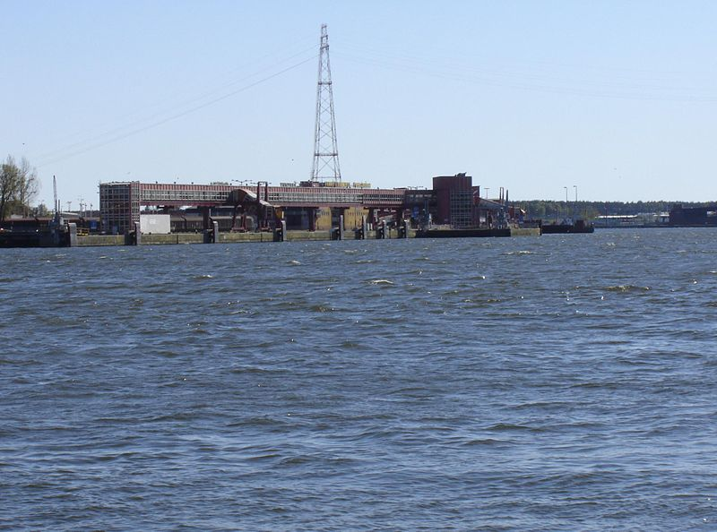 Widok na Termianal Promowy z wyspy Uznam